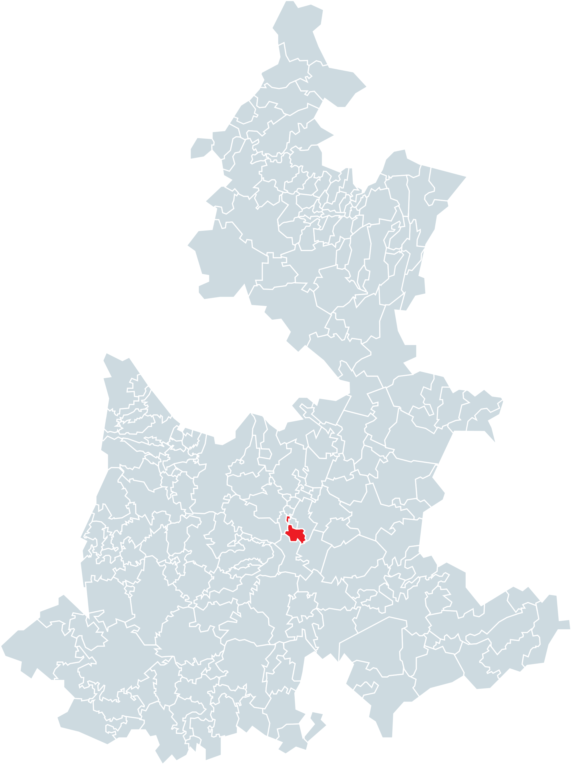 Municipio de Huitziltepec